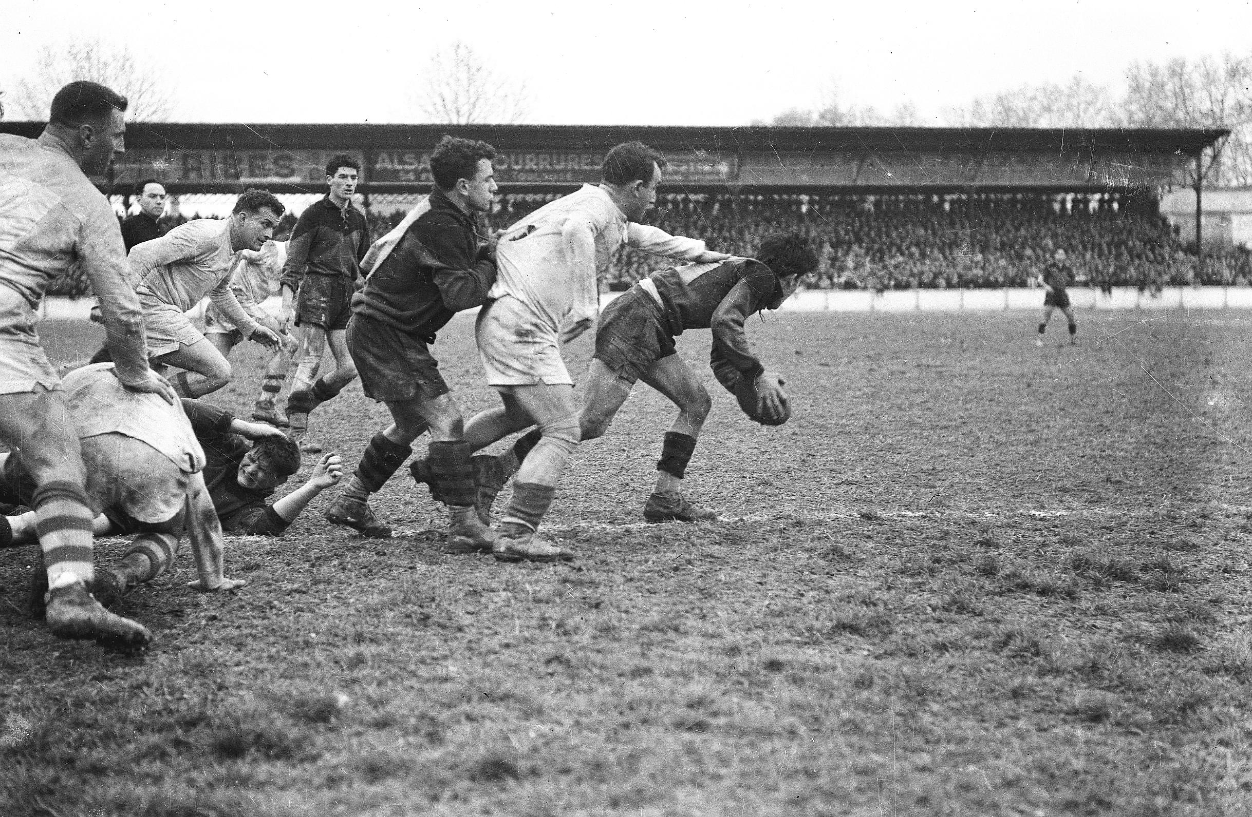 Stade du Hameau. Le 5 Février 1950. Vue d'une phase de jeu entre le Stade Toulousain et Pau au stade du Hameau à Pau.